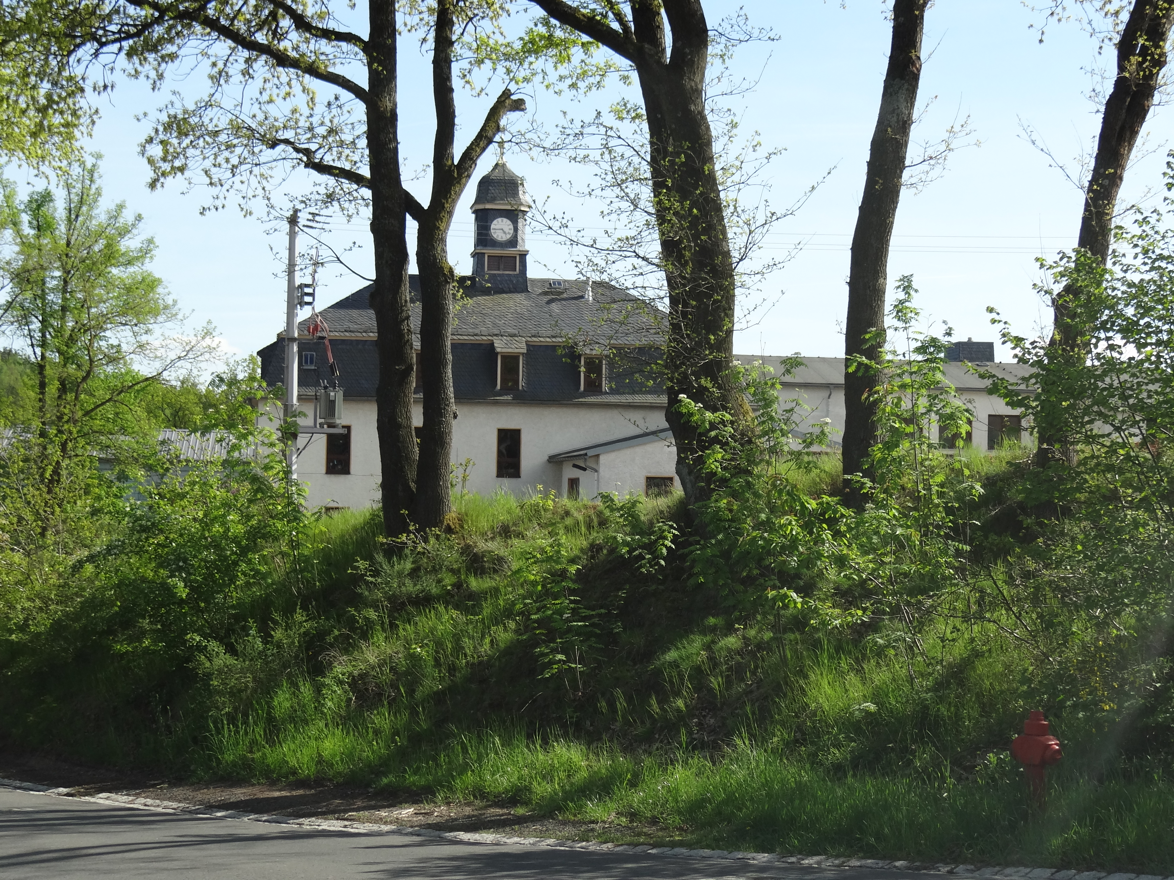 Blick auf die Grundschule in Schwärzdorf